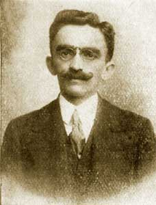 Fotografia de José dos Reis Carvalho (1800-1872), de autor desconhecido. Arquivo do Museu Histórico Nacional, Rio de Janeiro.